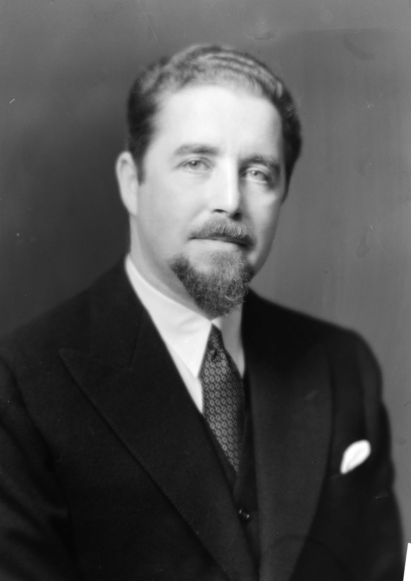 Teatersjef Johan Henrik Wiers-Jenssen, 1934